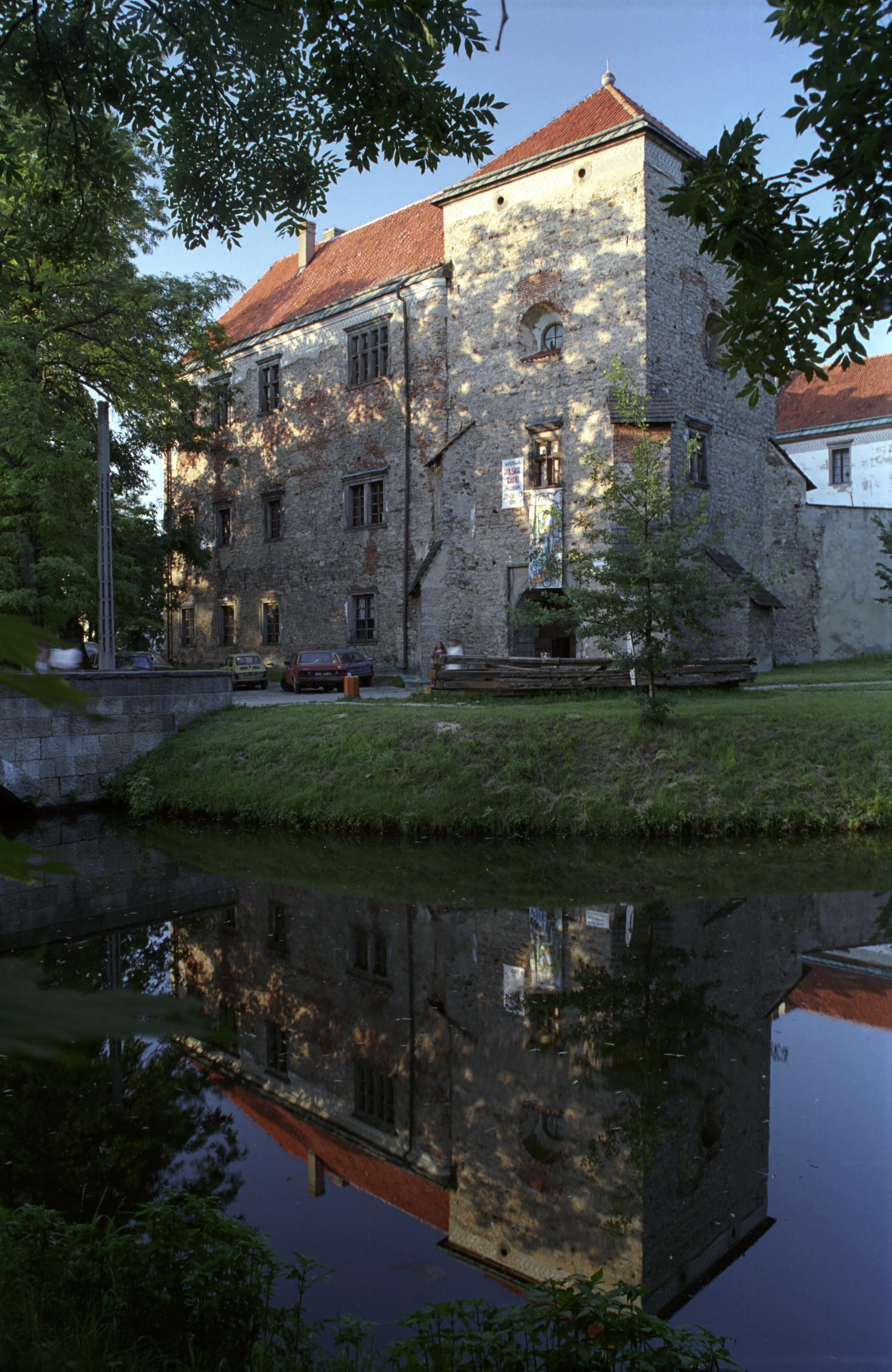 Poland, Szydlowiec Castle